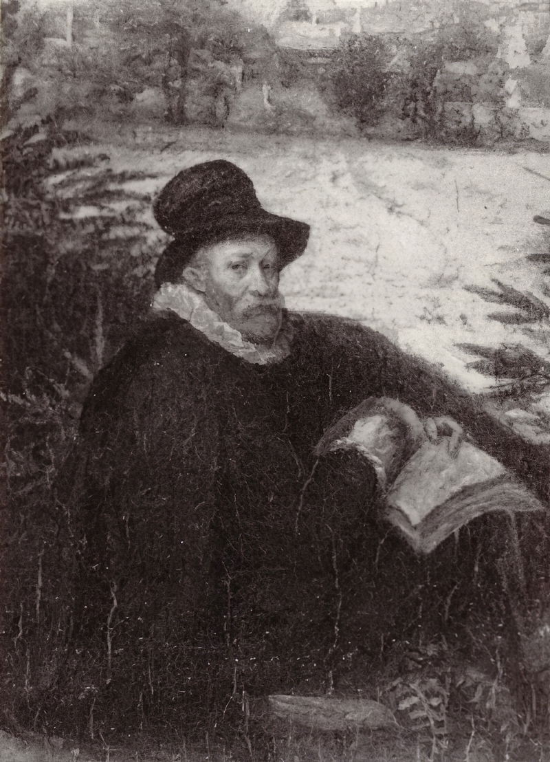 Selbstporträt aus Kaiserlicher Waldspaziergang mit dem Neugebäude